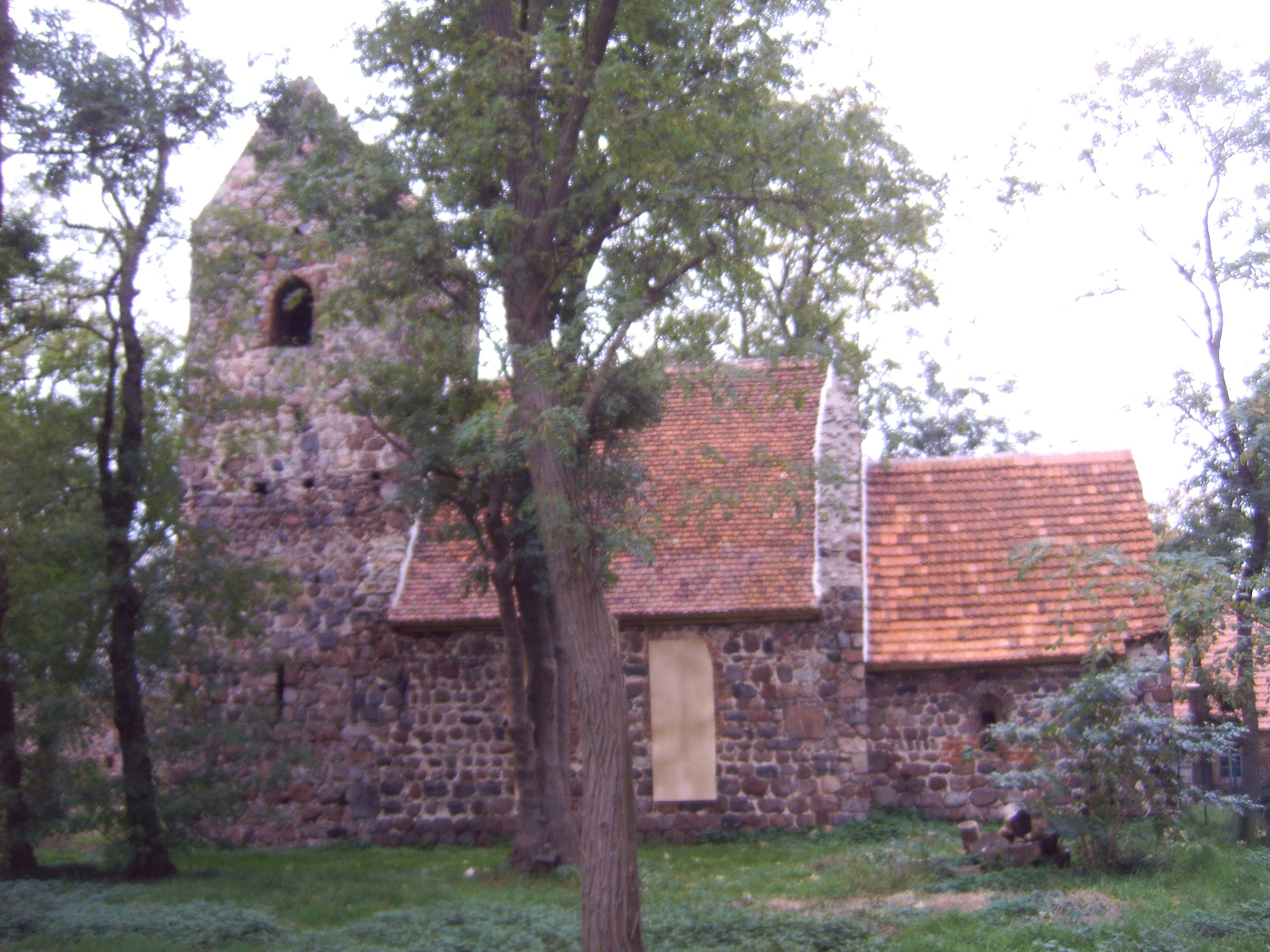 Gutskirche Welle, Altmark, Sachsen-Anhalt